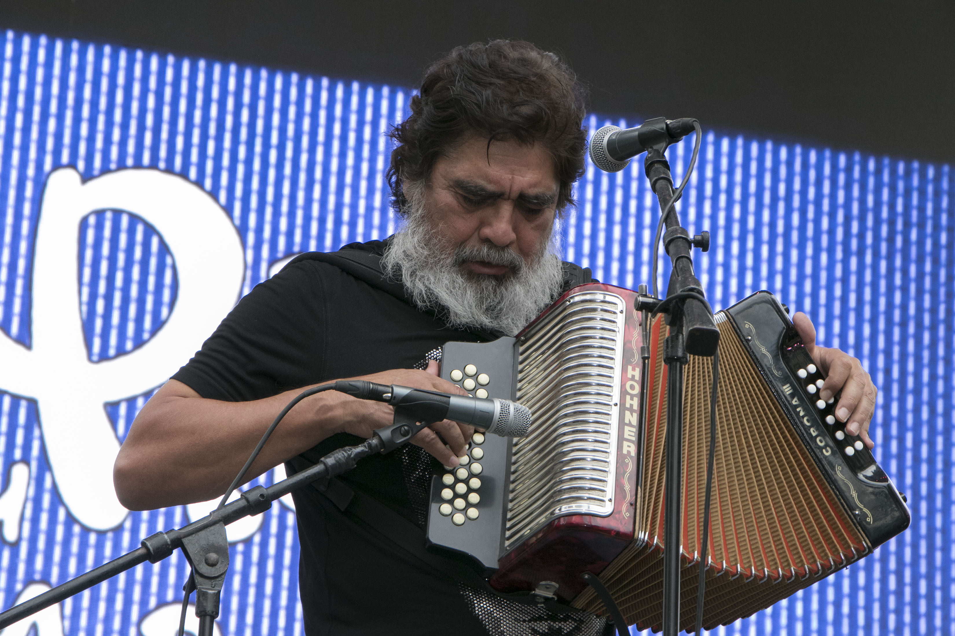 Viernes 9 de junio de 2017 En el Monumento a la Revolución, se llevó a cabo el concierto de clausura del Año Dual Alemania-México con la participación de Celso Piña, Schlachthofbronx, y Bostich + Fussible de Nortec Collective, donde aproximadamente 25 mil personas pudieron disfrutar este evento de manera gratiuta. Fotografía: Tania Victoria/ Secretaría de Cultura CDMX